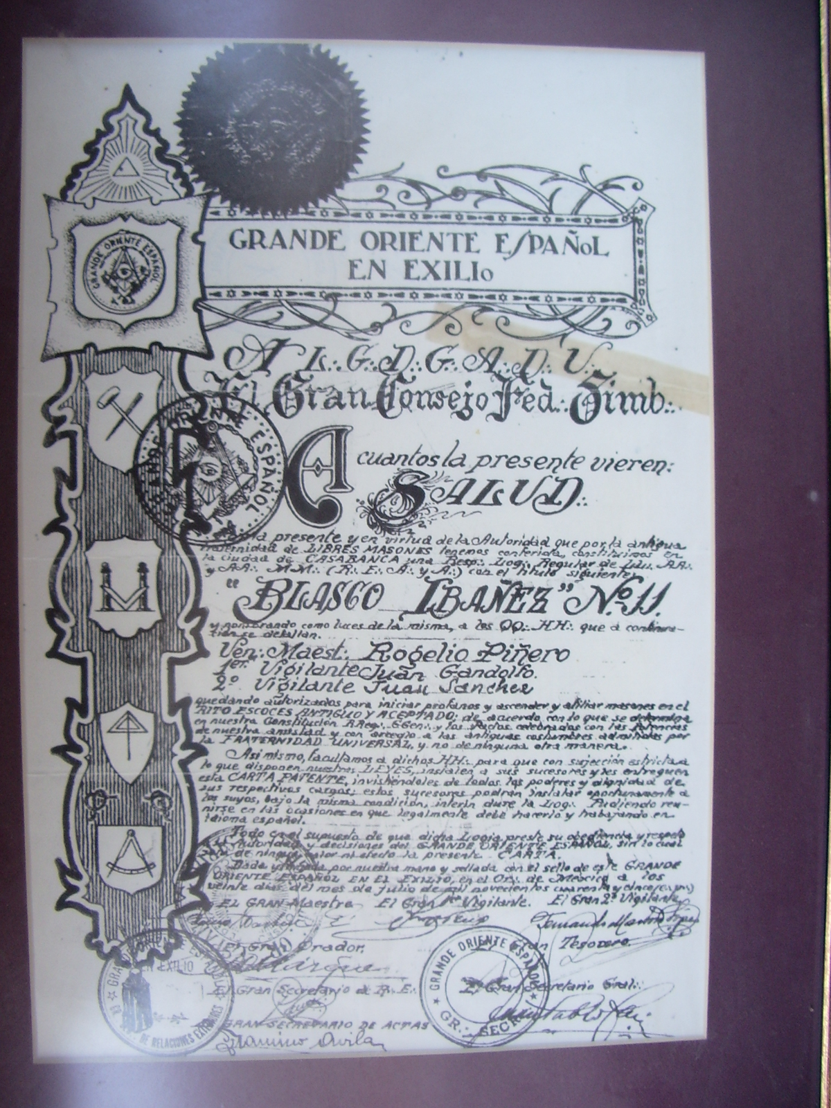 Carta Patente de la Logia Blasco Ibáñez en Casablanca 1941